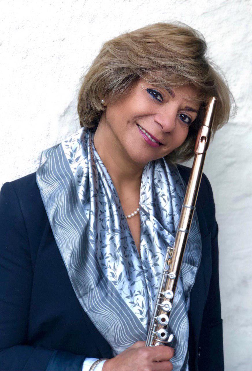 فیروزه نوایی